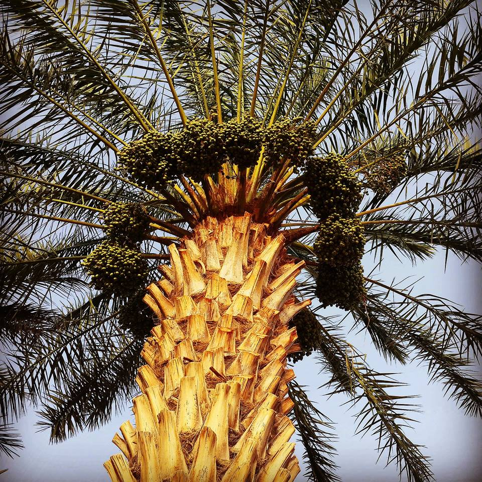 نگاره نخل خرما لاشار